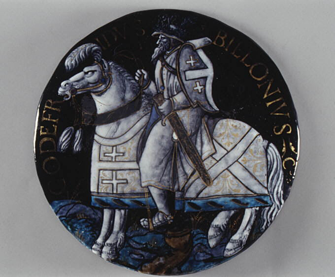 French, Limoges; Medallion; Enamels